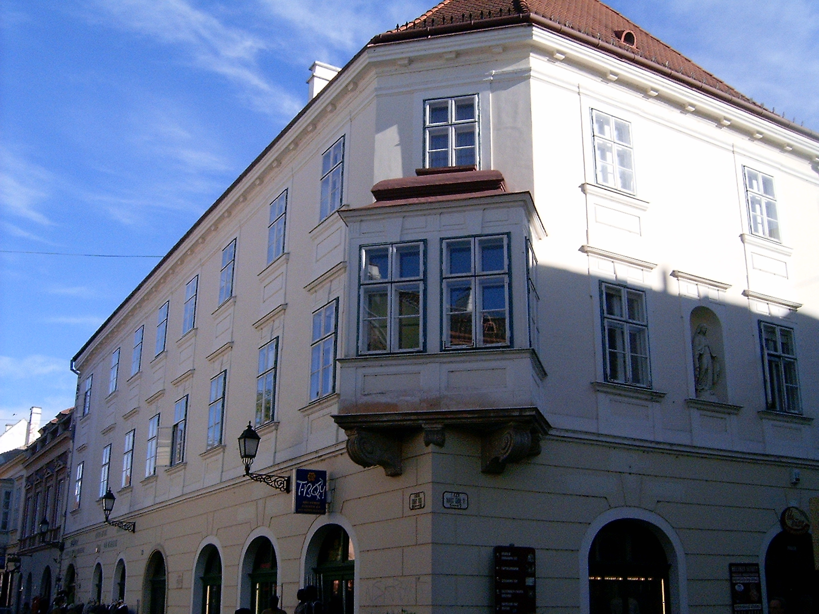 Az egykori Fekete Sas Fogadó Győrött, saját kép